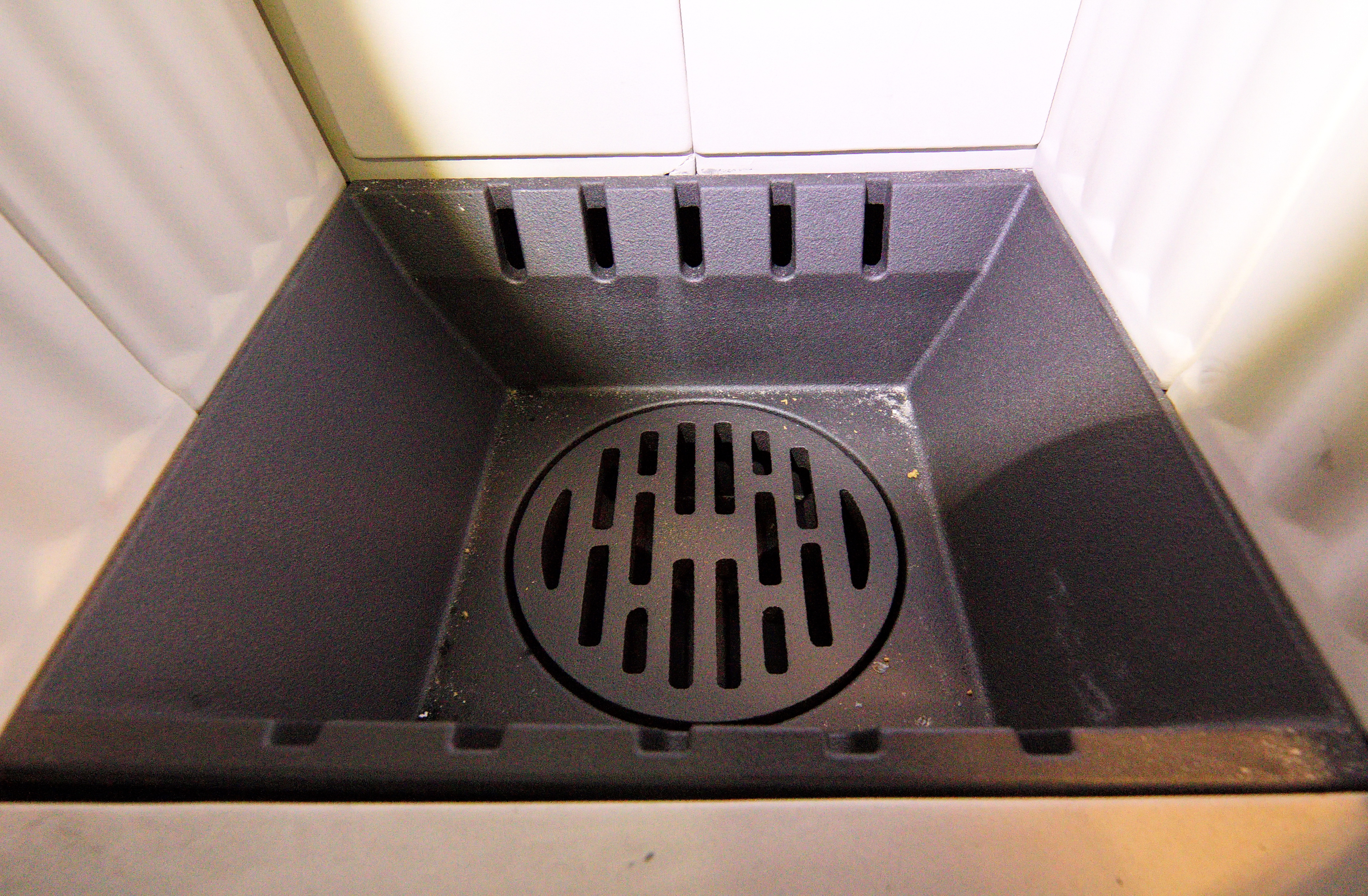 Feuerraum eines modernen Dauerbrandofen in der Form eines Kaminofens.